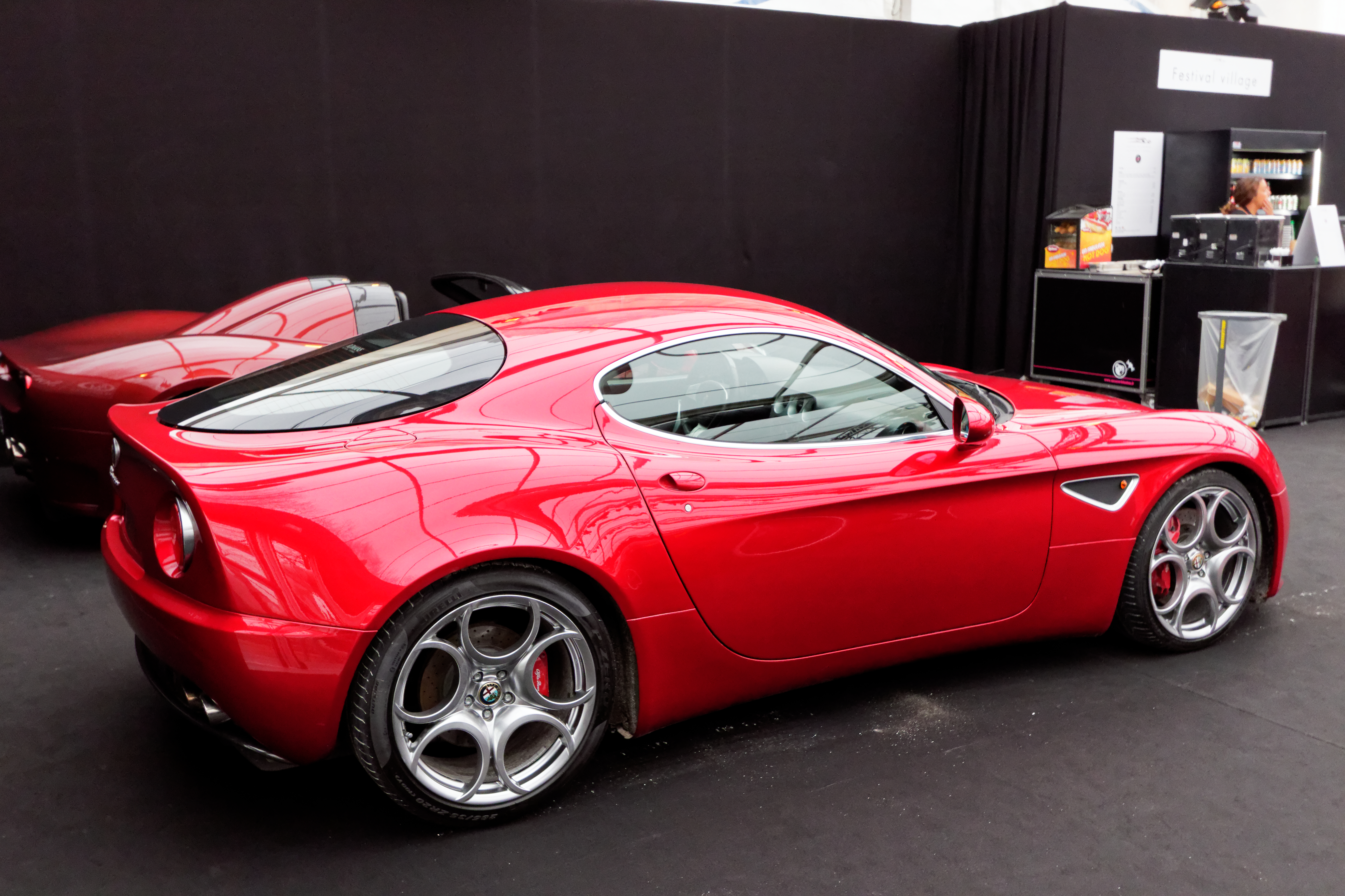 Un véhicule exposé lors de la vente RM Sotheby’s 2018 aux Invalides à Paris.